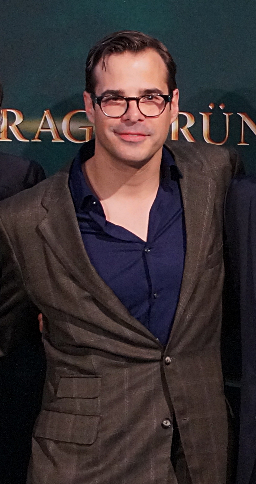 Johannes von Matuschka bei der Deutschlandpremiere von 'Samaragdgrün', Köln, Juni 2016.